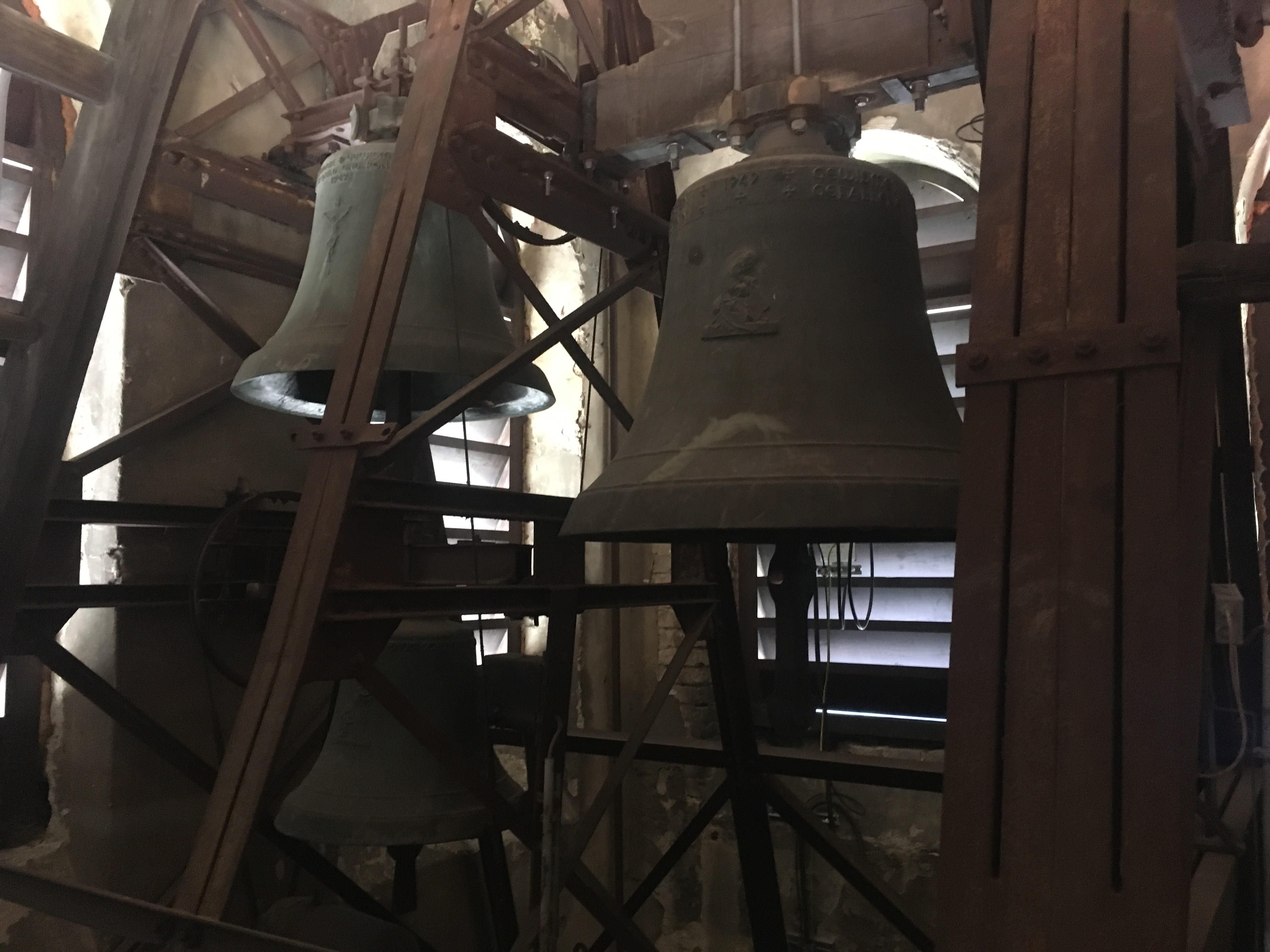 Pfarrkirche Enzersfeld im Weinviertel Glocken 2017